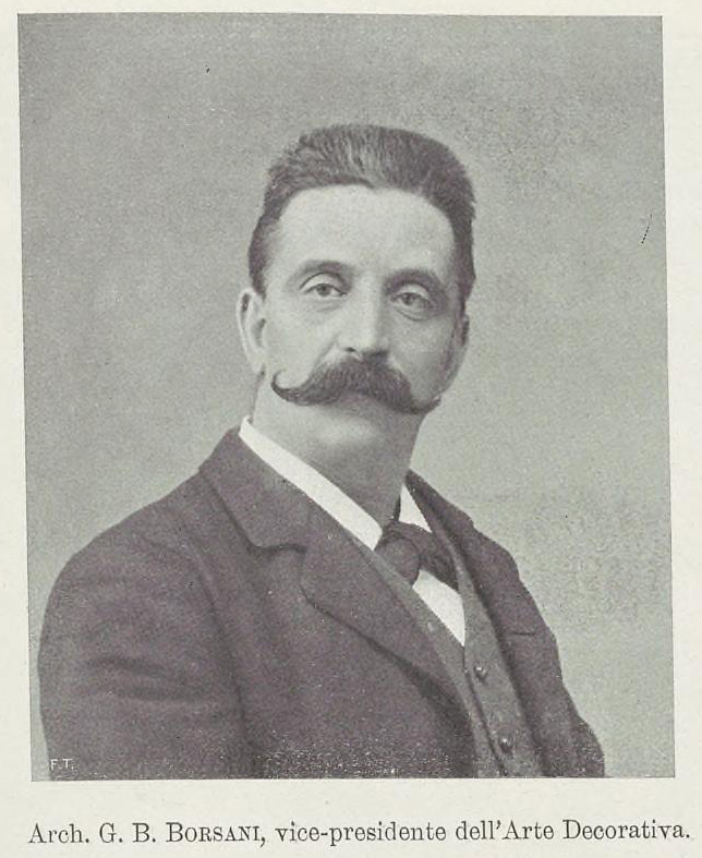 Arch. G.B. Borsani (1850-1906)